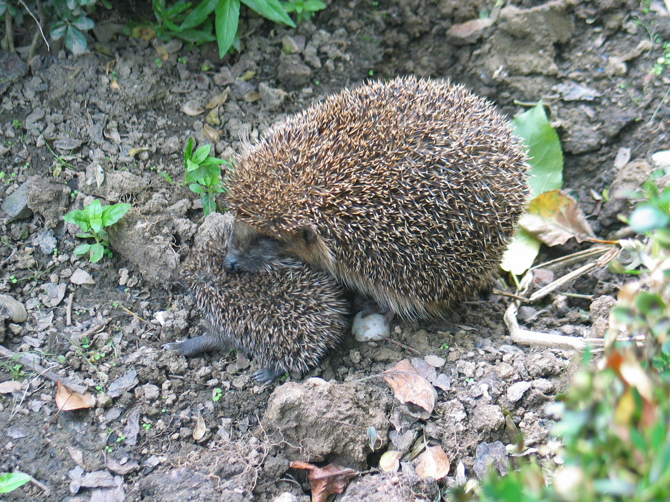 Igel (Erinaceus europaeus) mit Jungtier